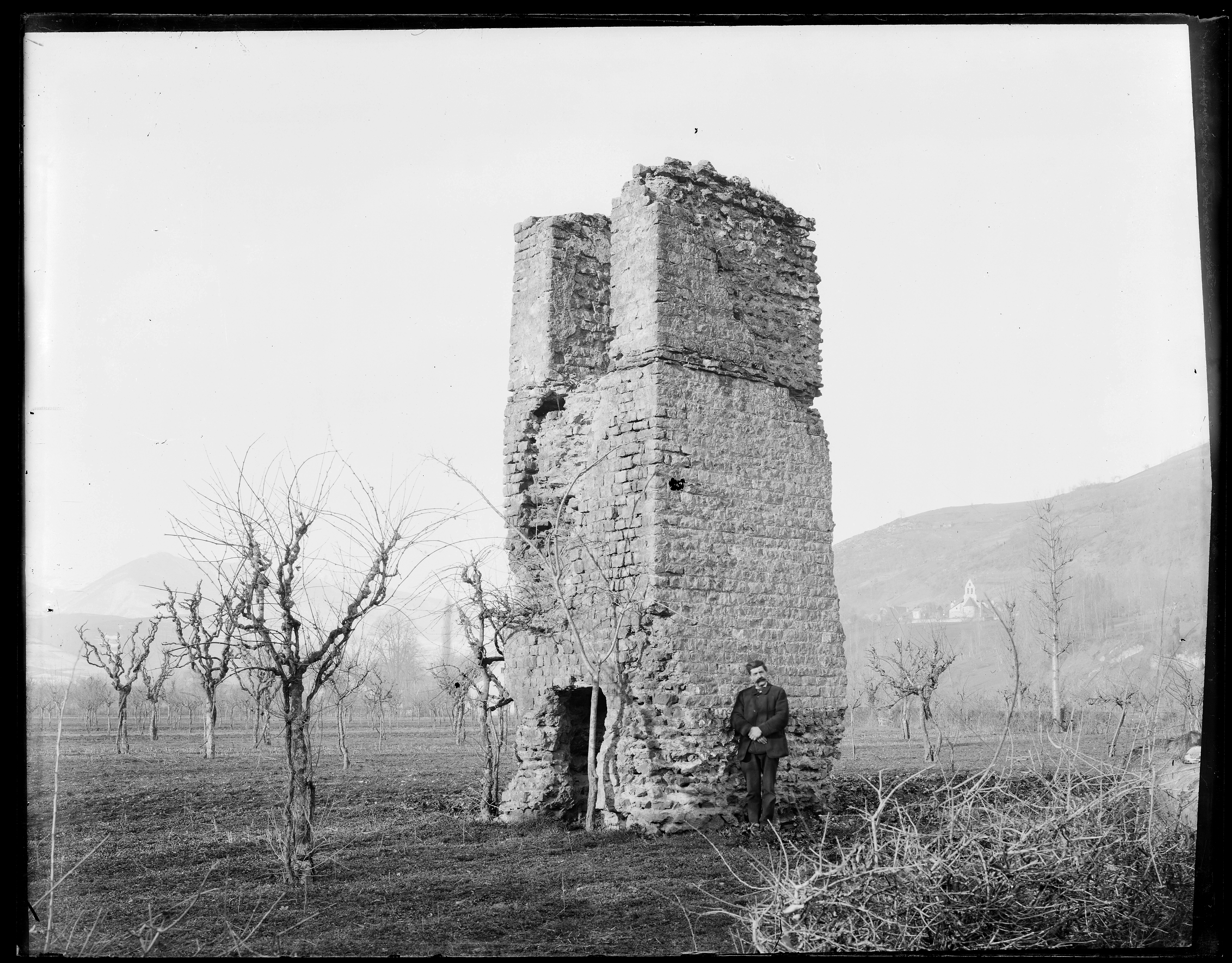 plaque négative au gélatino-bromure d'argent, format 21x27 cm. Sans inscription ni mention d'auteur.